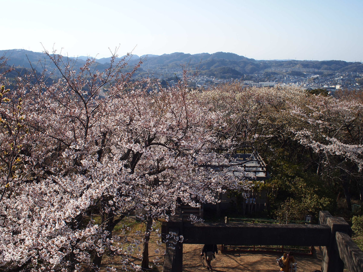 衣笠山公園。神奈川県横須賀市。2012年4月8日撮影